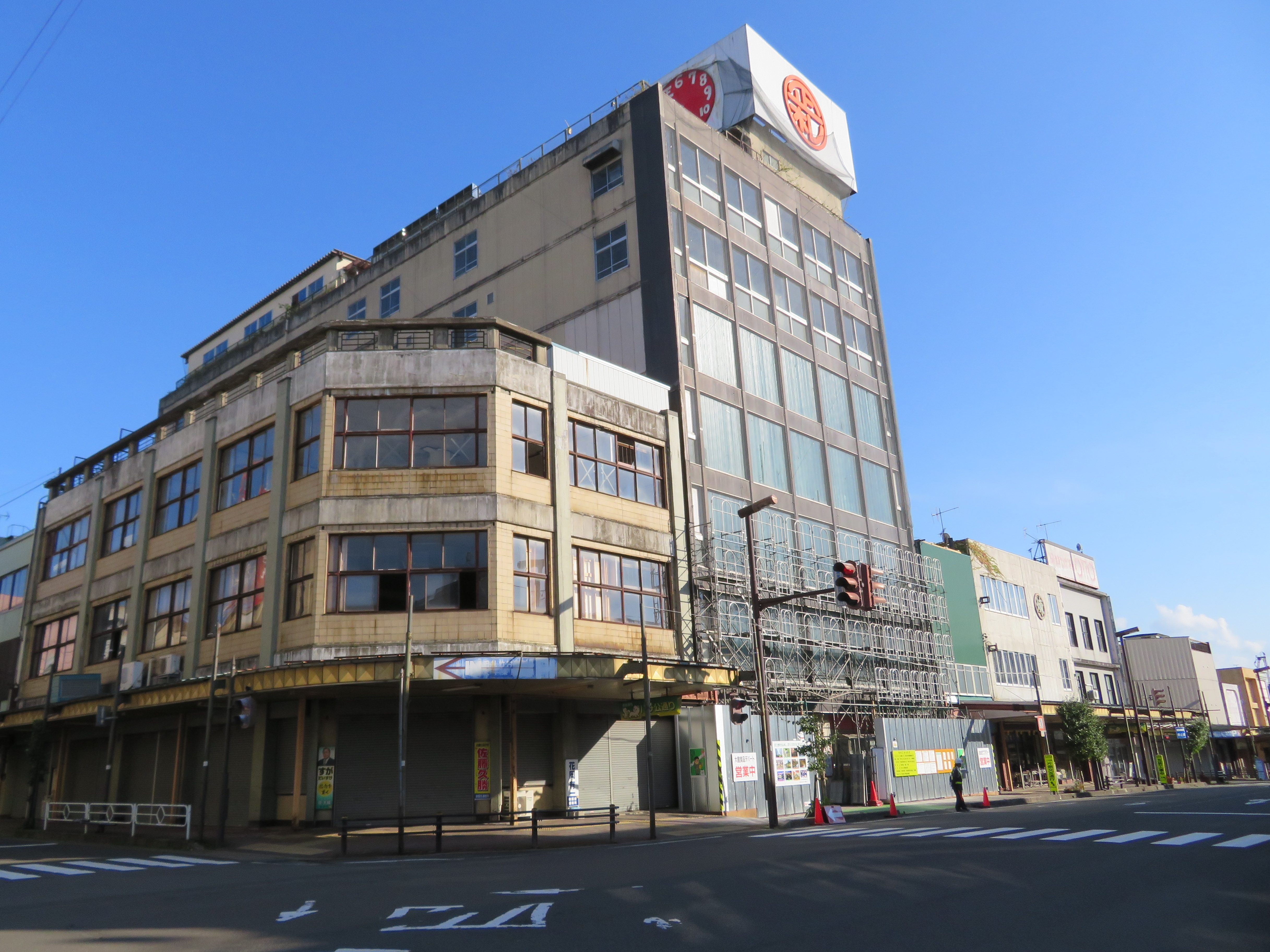 正札竹村：秋田県大館市大町 Canon PowerShot SX720 HS